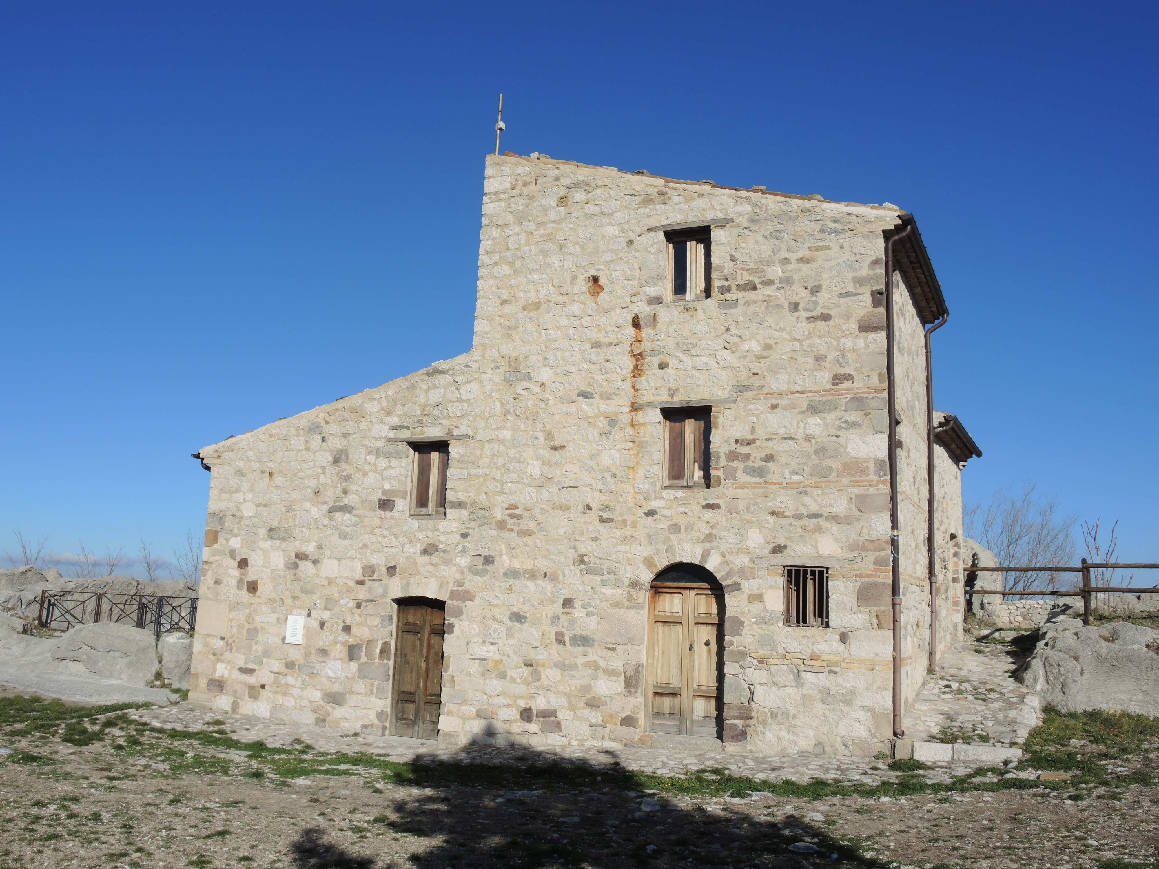 Gessopalena